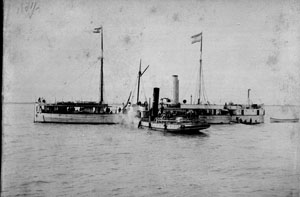 Combate del espinillo